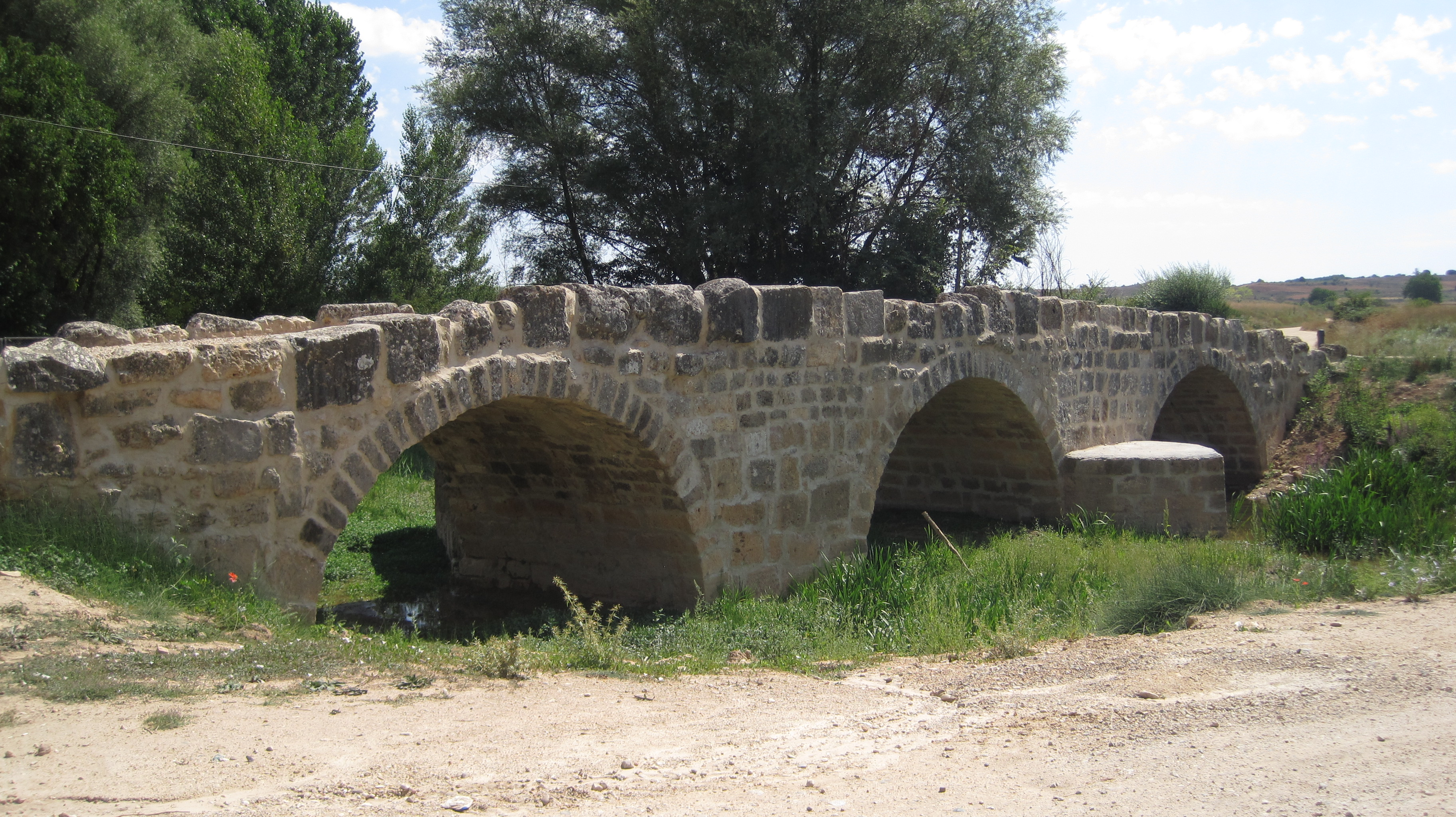 Vista de uno de los puentes romanos de Coruña del Conde (Burgos, España).